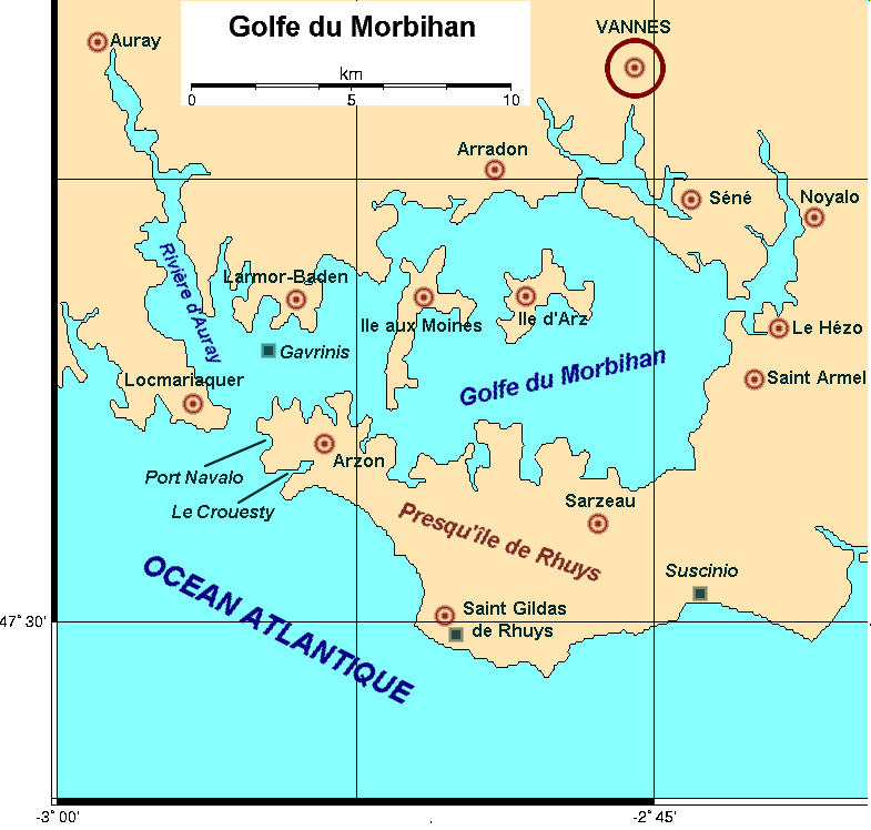 Carte du golfe du Morbihan avec ses 2 îles principales - réalisation personnelle sur fond de carte utilisant le logiciel GMT (licence GNU)